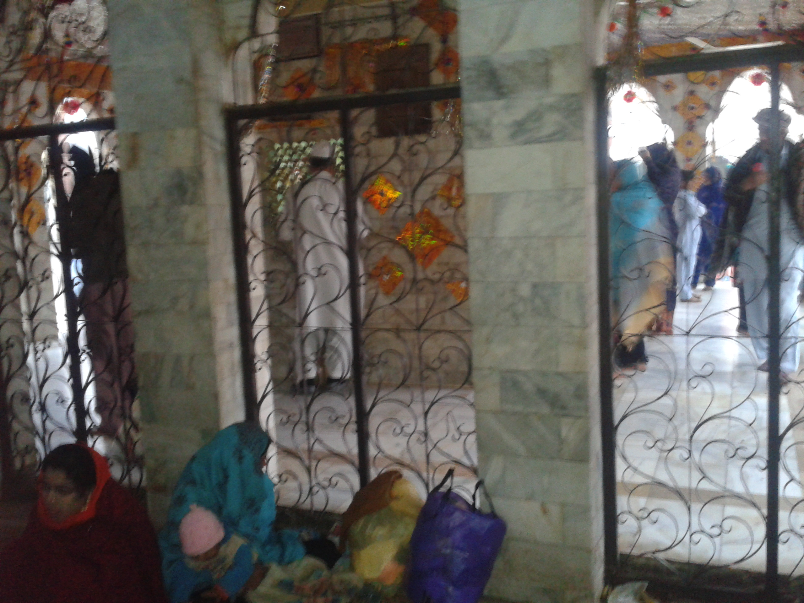 Darbar Hazrat Baba Farid ud Deen Ganj Shakar Rahmatullah Alaih